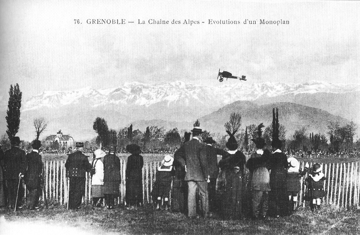 Fête de l'aviation les 16,17 et 18 mai 1912 sur le polygone militaire de Grenoble.